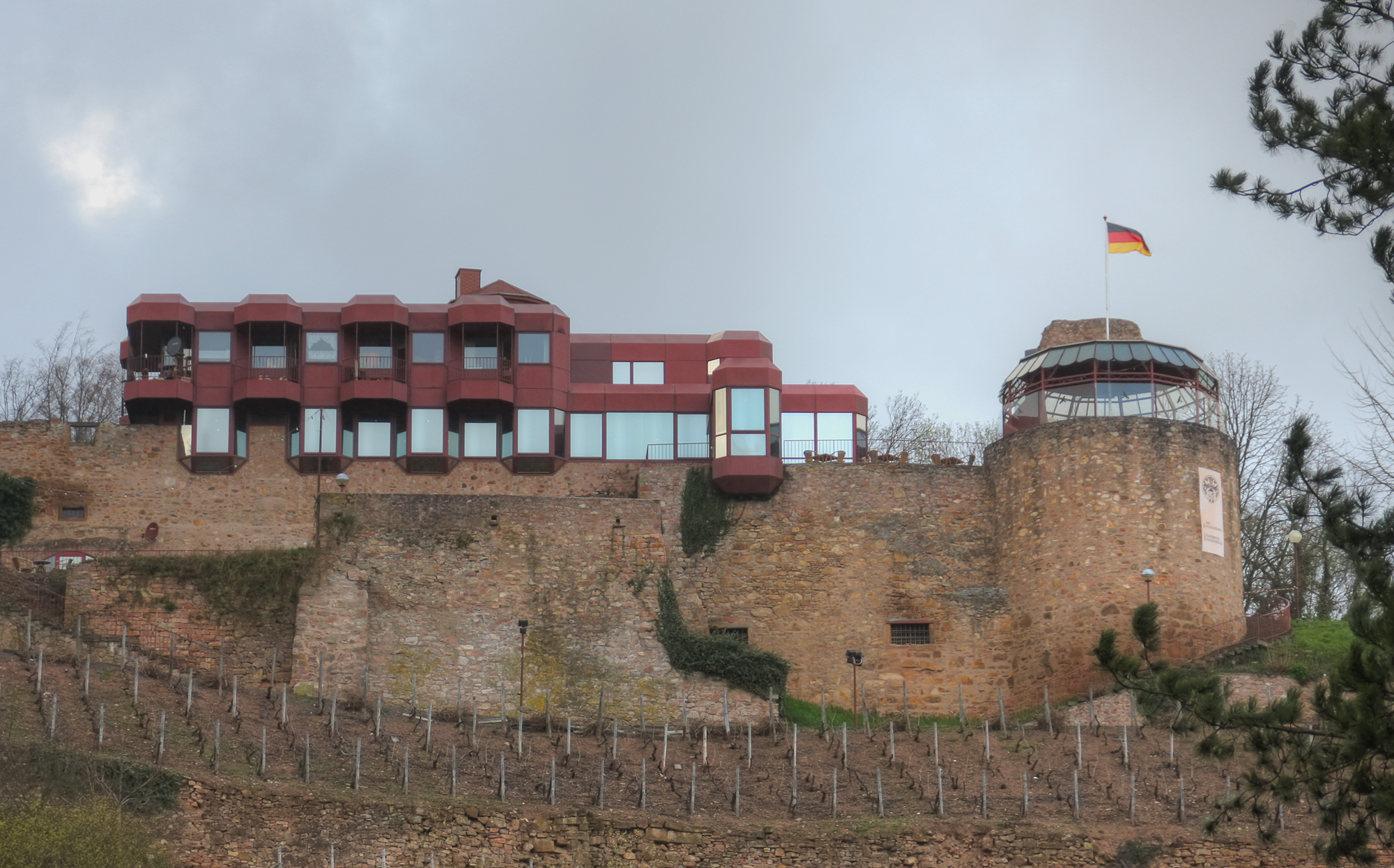 Bad Kreuznach, Kauzenburg, Architekt Gottfried Böhm (*1920) Pritzker-Architektur-Preis Träger 1986